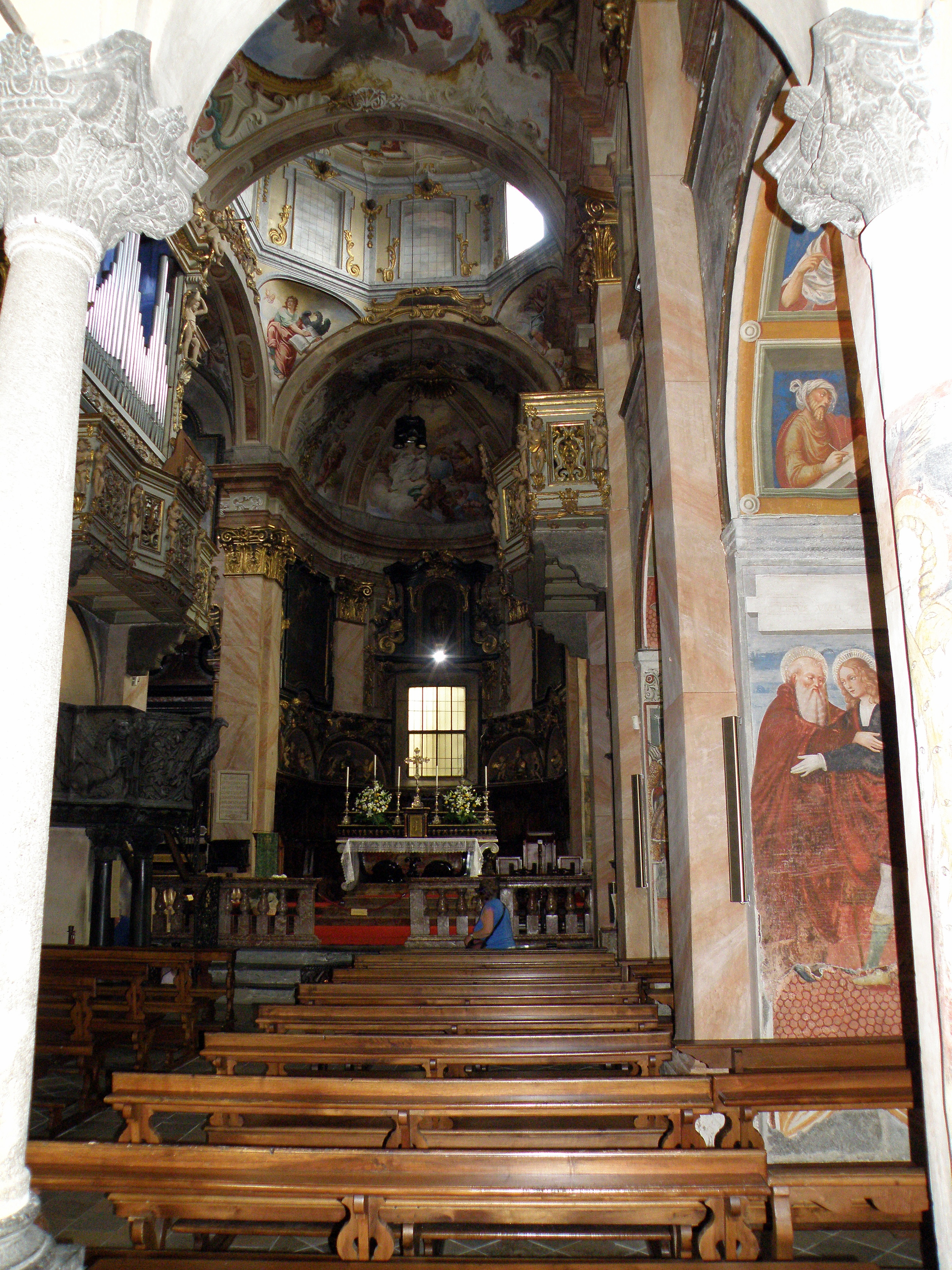 Orta San Giulio (NO). Isola di San Giulio, basilica, vista interna.